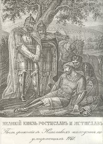 Это репродукция картины Бориса Чорикова к Истории Карамзина: . 1161 год. 6 марта в сражении с Ростиславом Мстиславичем Смоленским погиб князь Изяслав Давыдович, князь Черниговский.